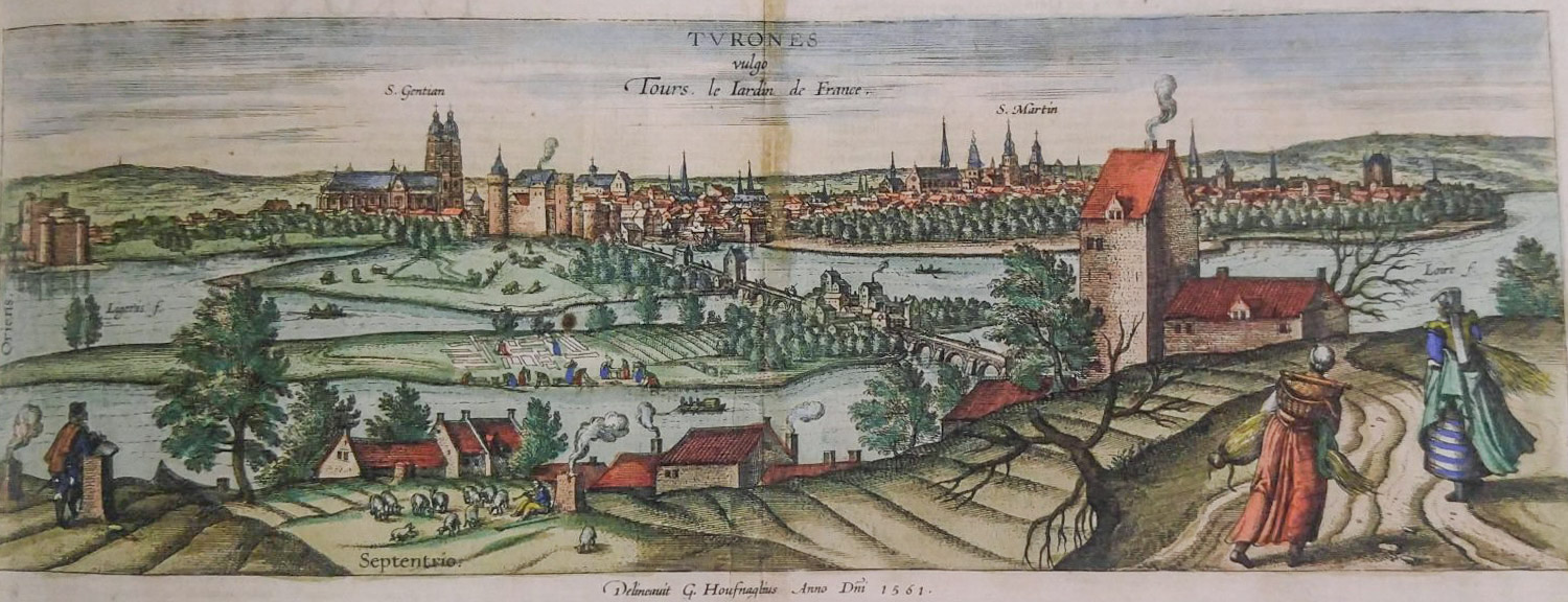 gravure de la ville de Tours en 1561 par Joris Hoefnagel